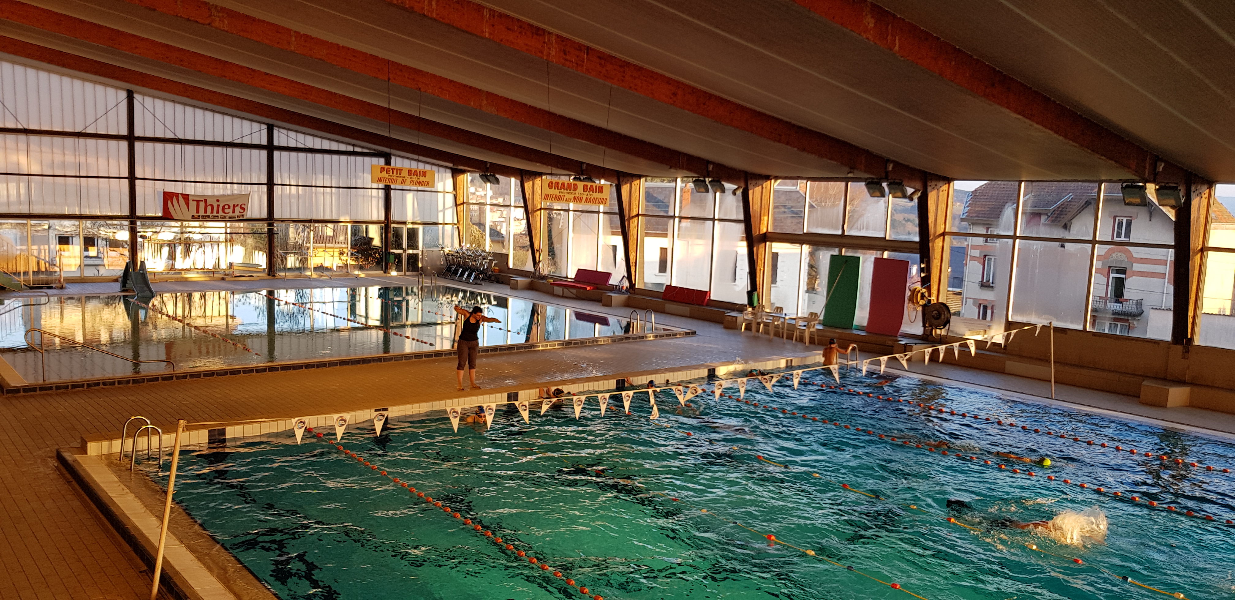 Piscine municipale de Thiers